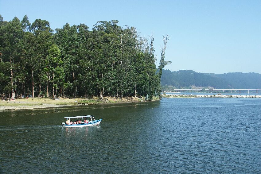 Río Maule, Chile